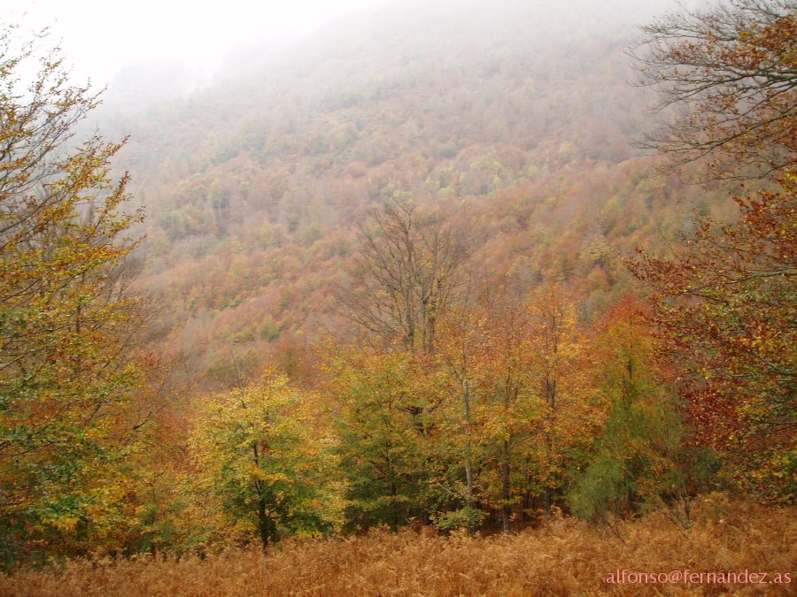 Otoño en el bosque de Peloño (Asturias, España). Las hayas se visten de rojo durante esta estación. (Autor: Alfonso Fernandez - Noviembre de 2006) Autumn in Peloño Forest (Asturias, España). The beech are red dressed during this season. (Photographer: Alfonso Fernandez - November 2006)